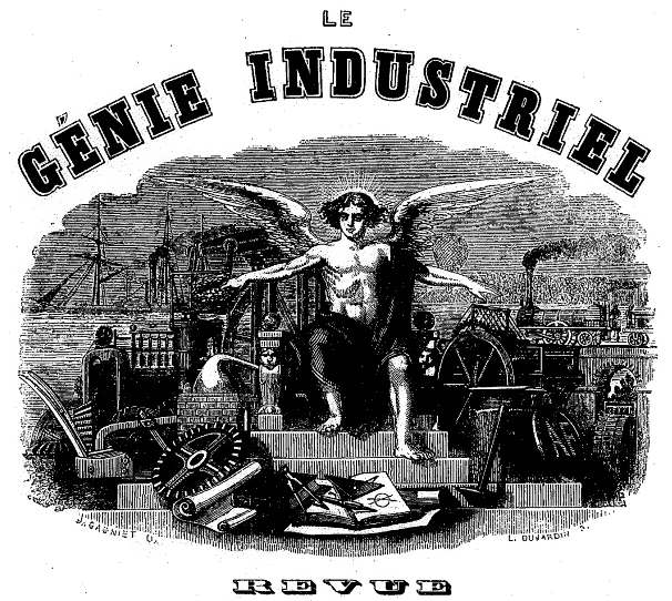 Gravure revue Génie Industriel publiée en 1856